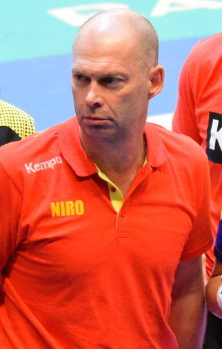 Equipe de Roumanie de handball féminin Le 29 novembre 2015, lors du match Roumanie / Cuba pour le compte du TIPIFF 2015. Au stade Pierre de Coubertin à Paris.